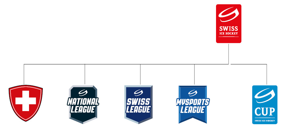 offzielle Logos der SIHF